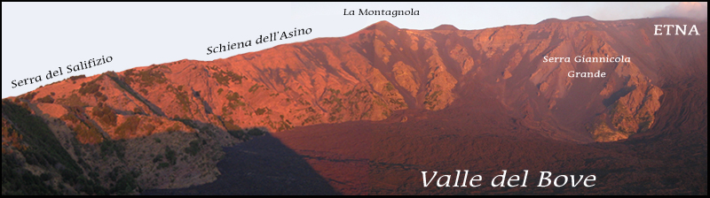 Valle del Bove, Etna, Zafferana Etnea (CT) - Sovrapposizione di due foto scattate all'alba da Monte Zoccolaro - Foto D. Pennisi.